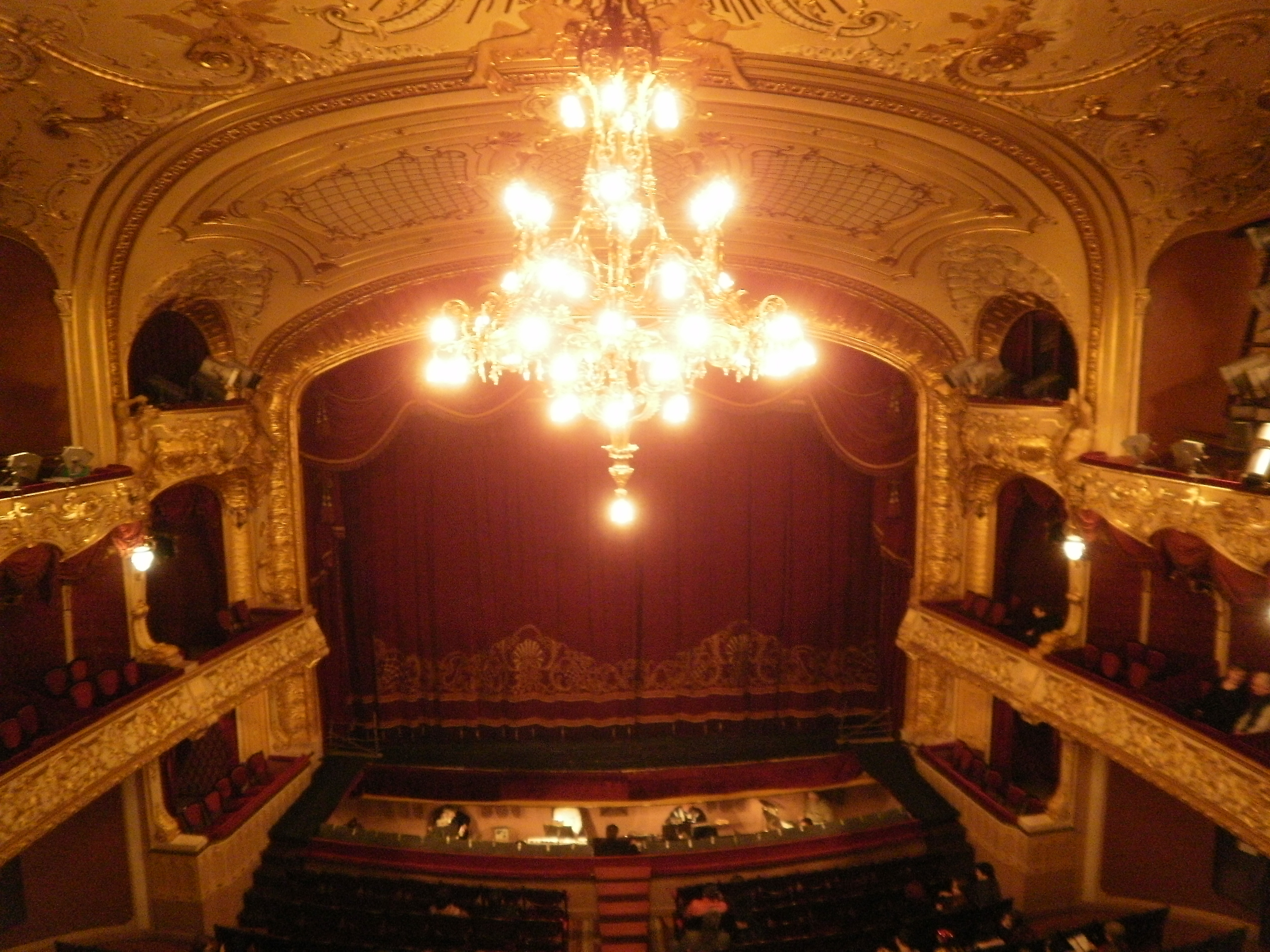 Мiський театр (мур.) , Чернівці , пл.Театральна, 1